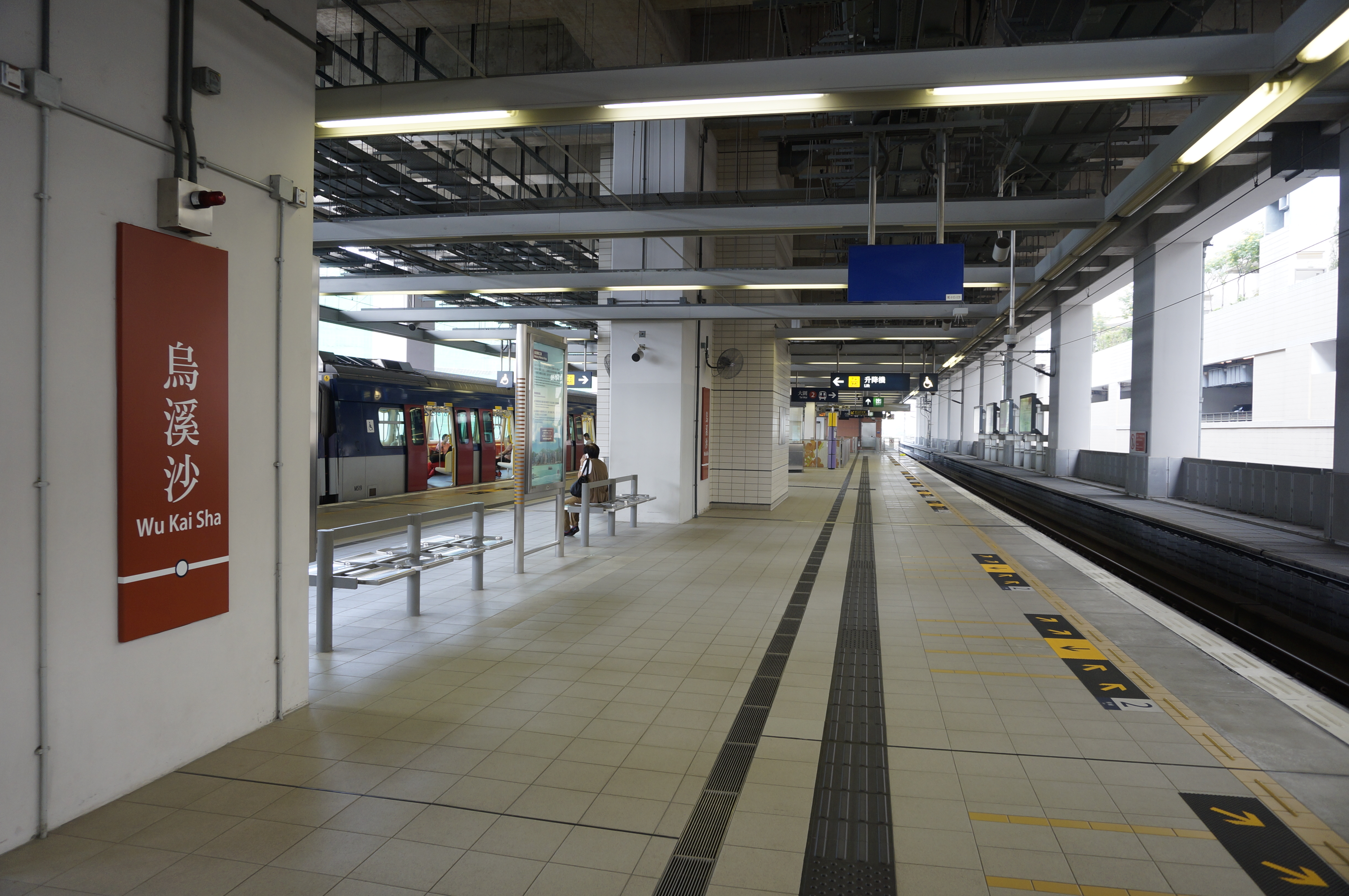 港鐵烏溪沙站月台